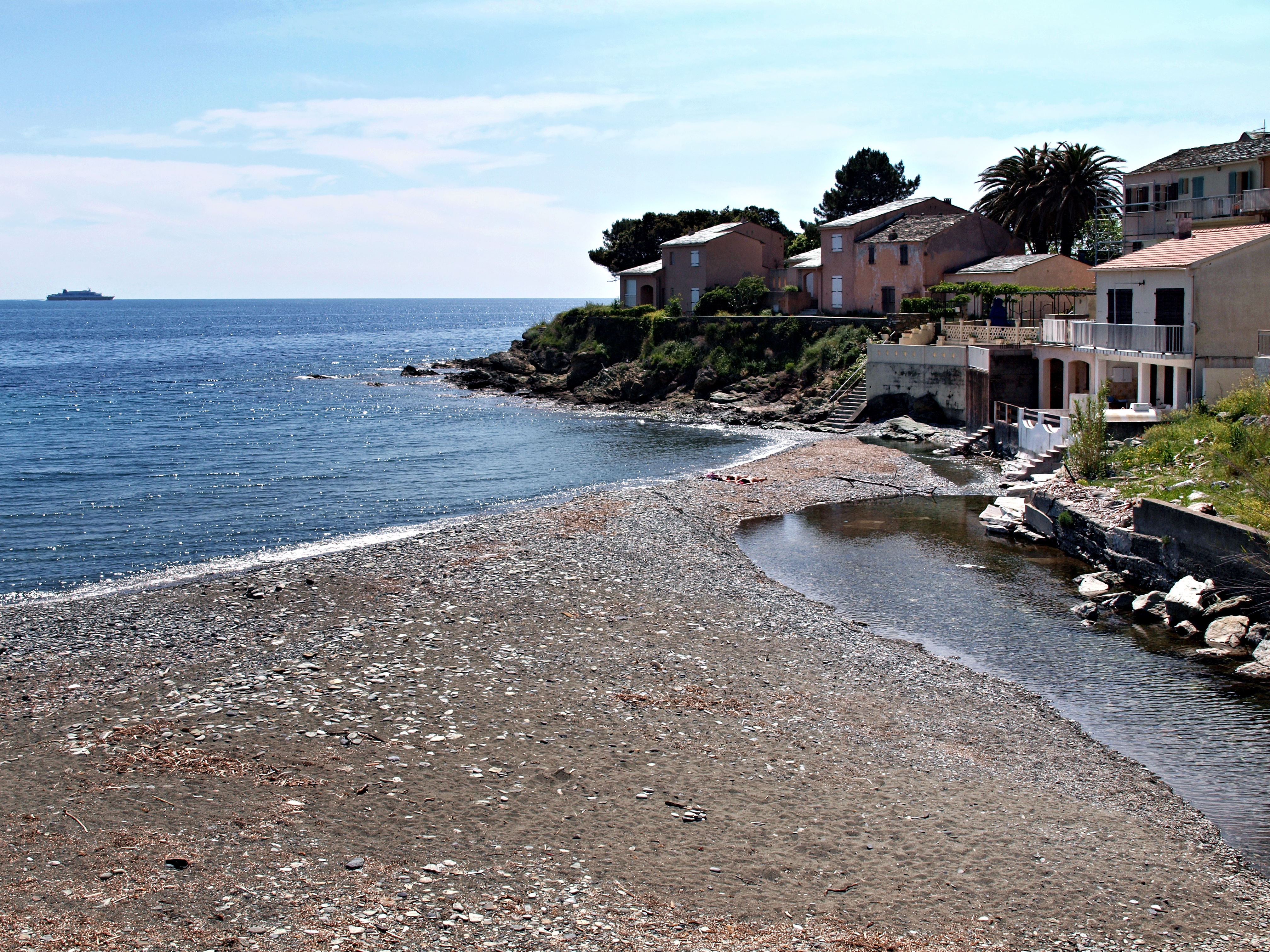 Santa-Maria-di-Lota, Cap Corse (Corse) - Embouchure du fiume de Poggiolo au sud de la plage de Miomo